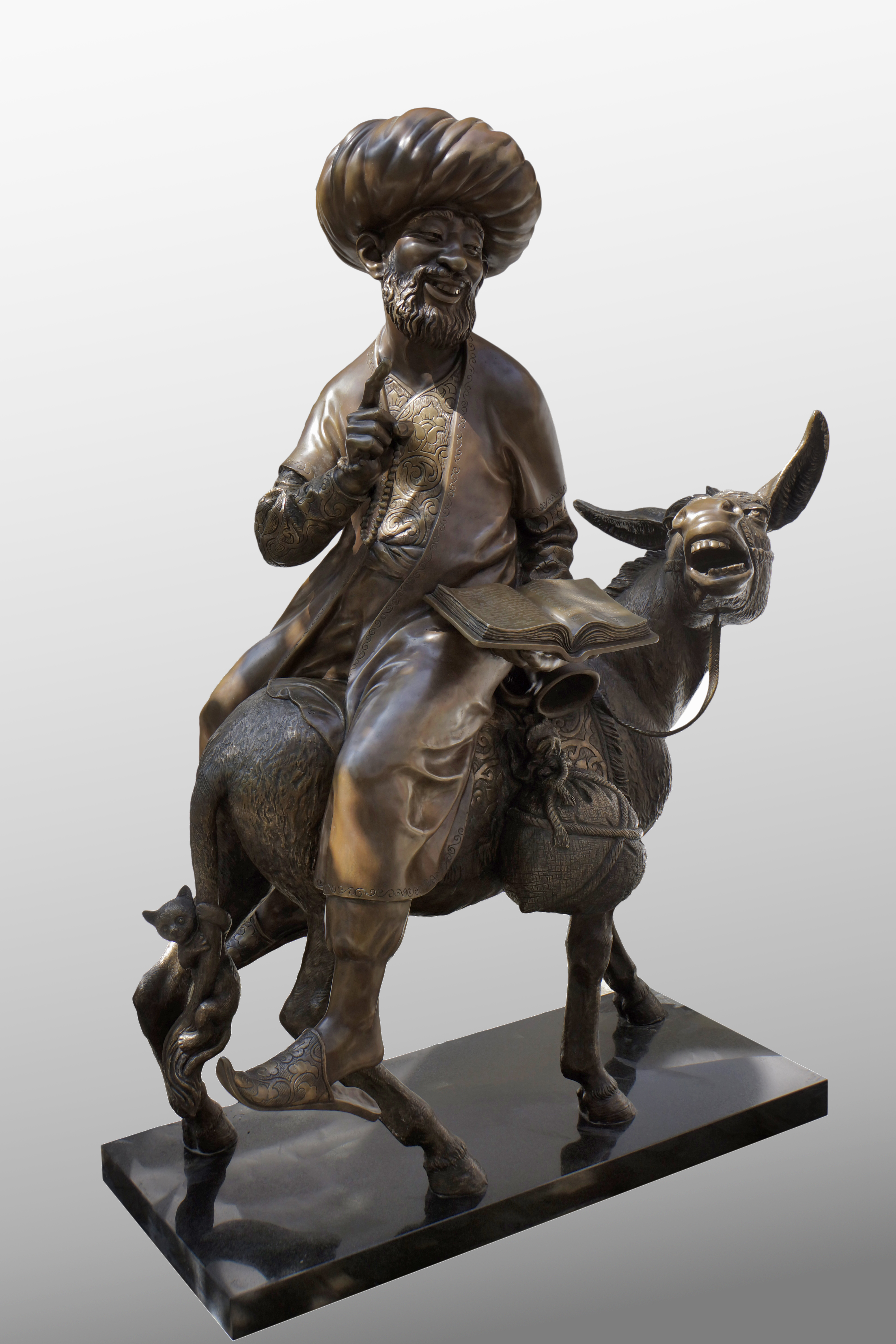 Ходжа Насреддин.Автор Катиб Мамедов